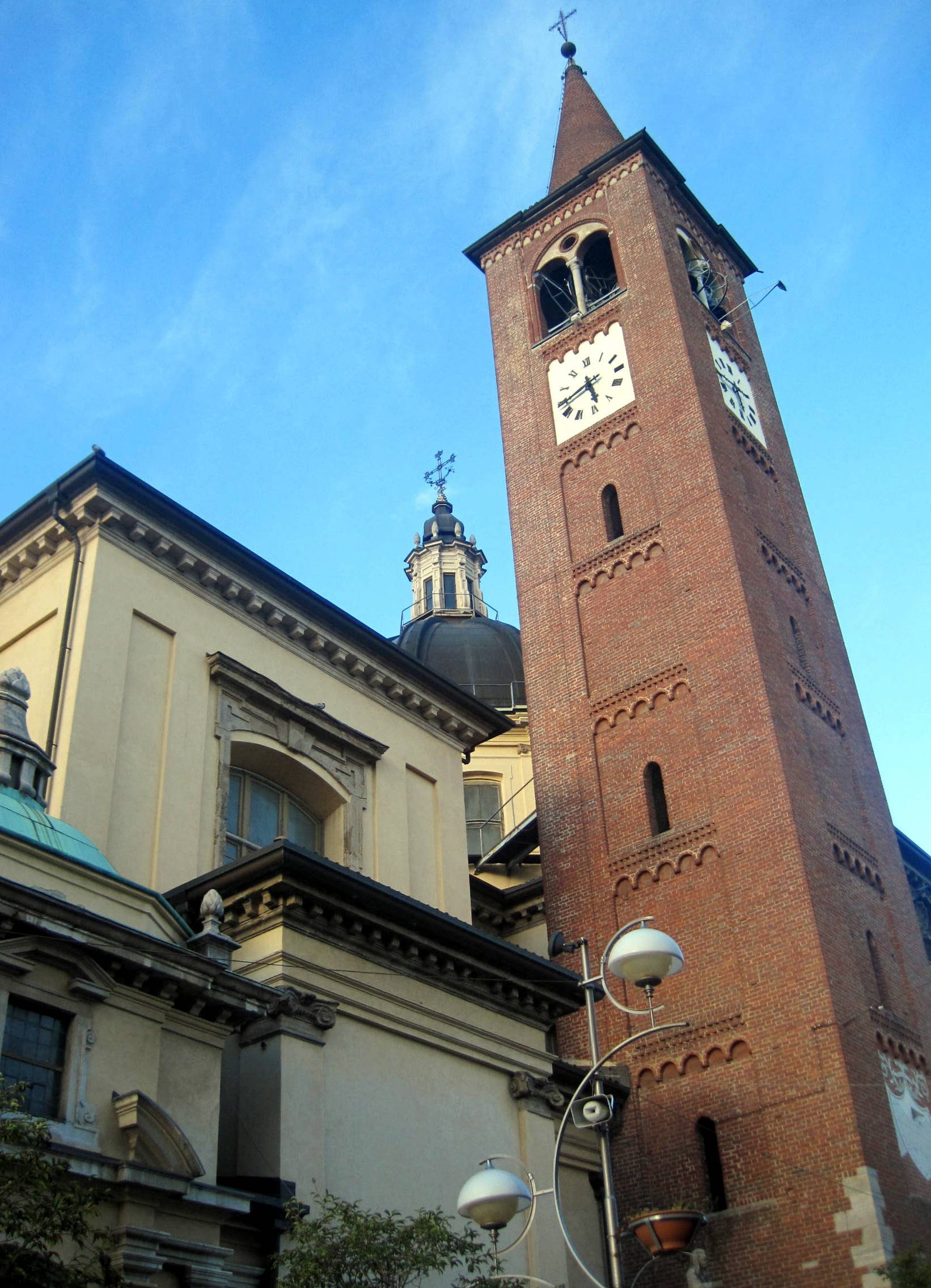 Il campanile del 1400, svetta nei cieli blu' . Una giornata di piena luce. This is a photo of a monument which is part of cultural heritage of Italy.